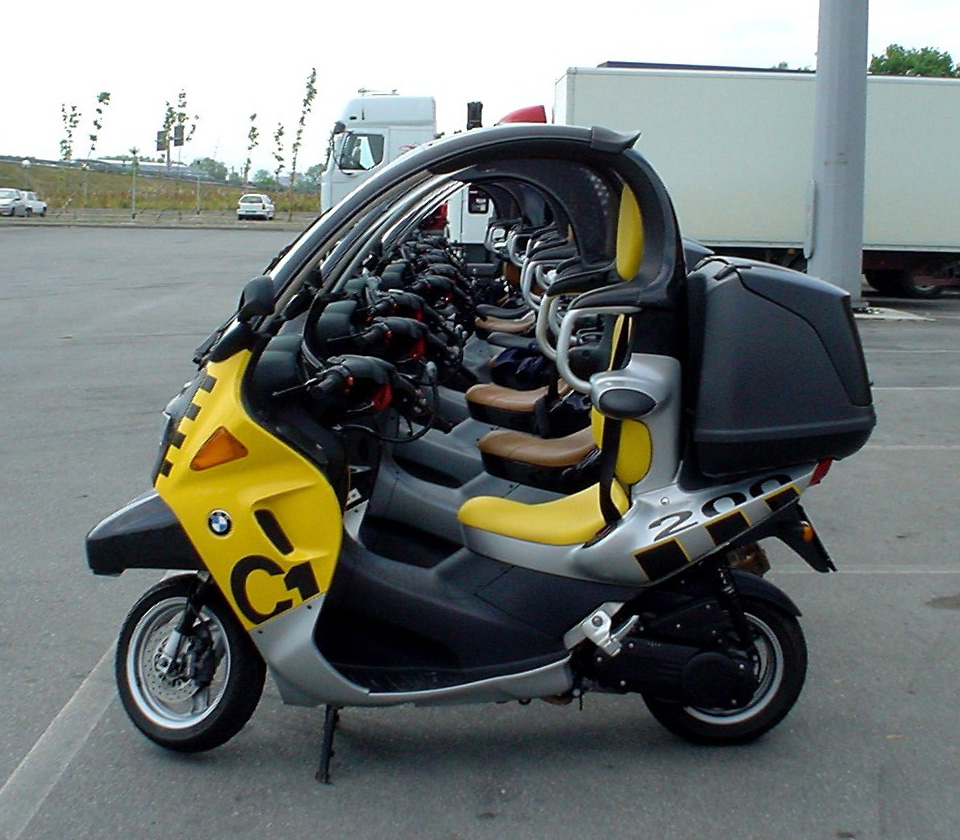 BMW C1